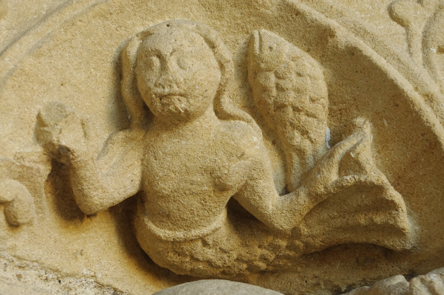 Sirène, relief du portail nord de la collégiale Saint-Martin de Candes-Saint-Martin, Indre-et-Loire (XIIIe s)